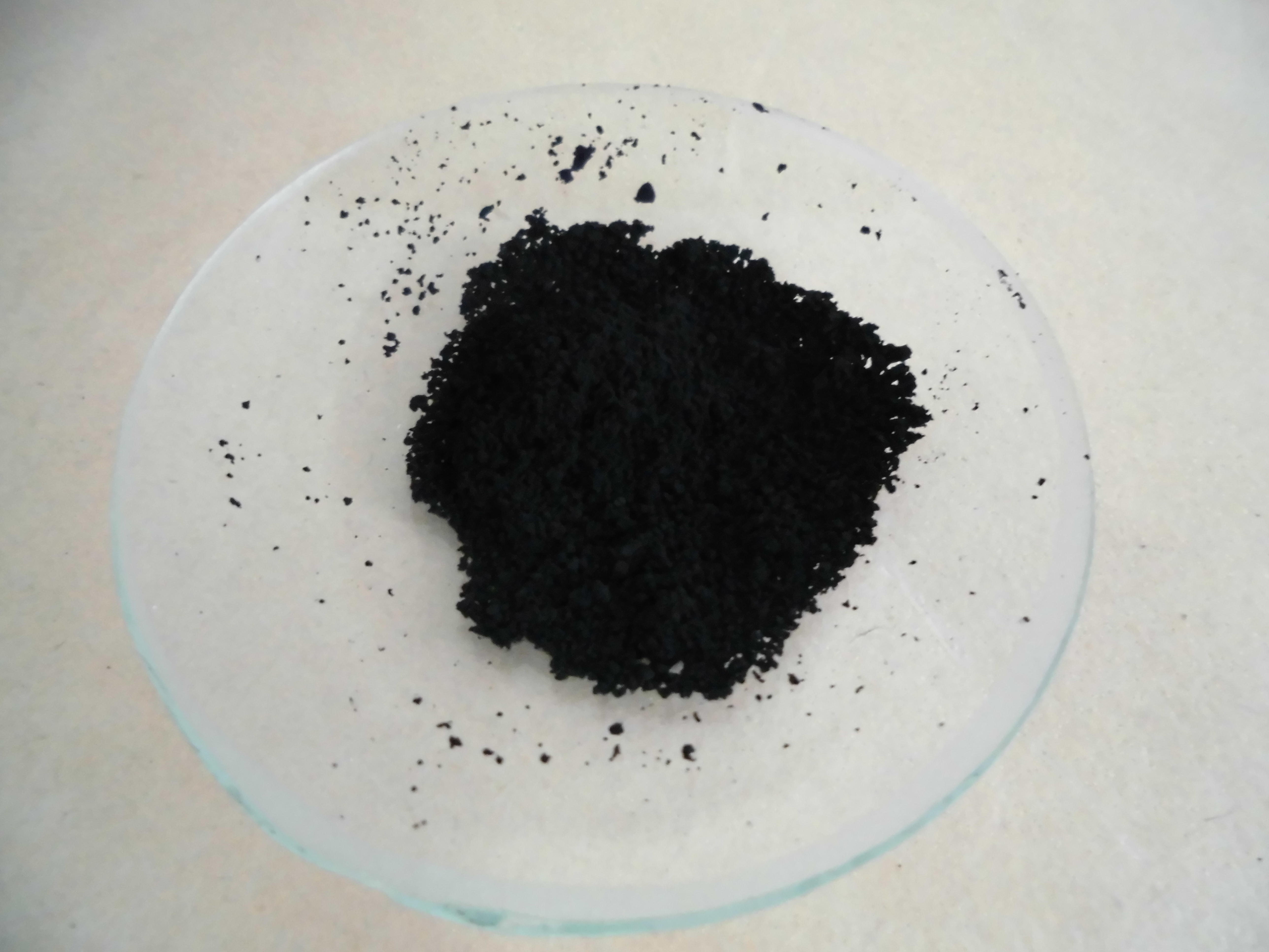 二氧化铅，AR，纯度≥97.0%